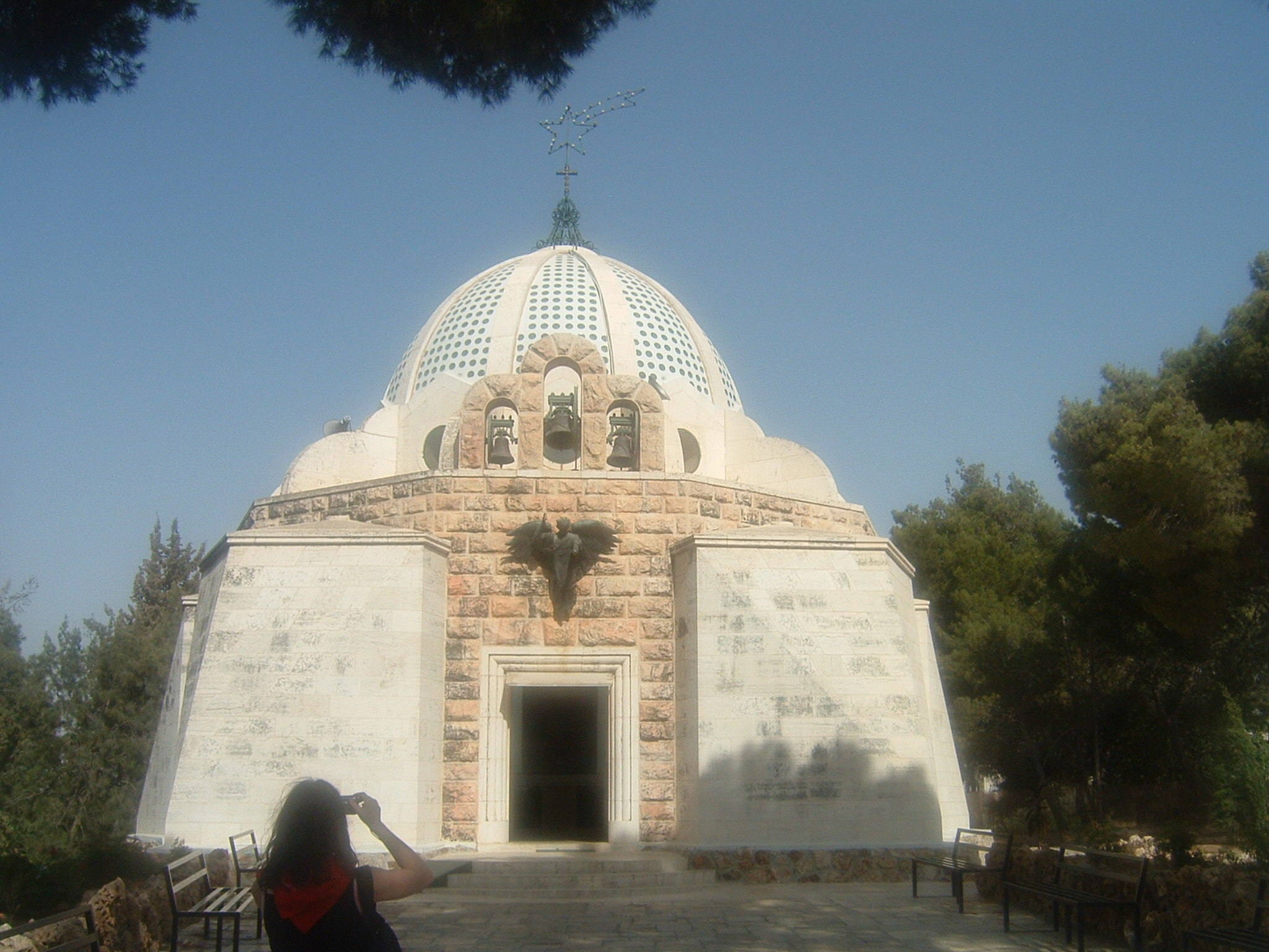 Foto scattata da me il 9 giugno 2008 La chiesa al campo dei pastori a Betlemme